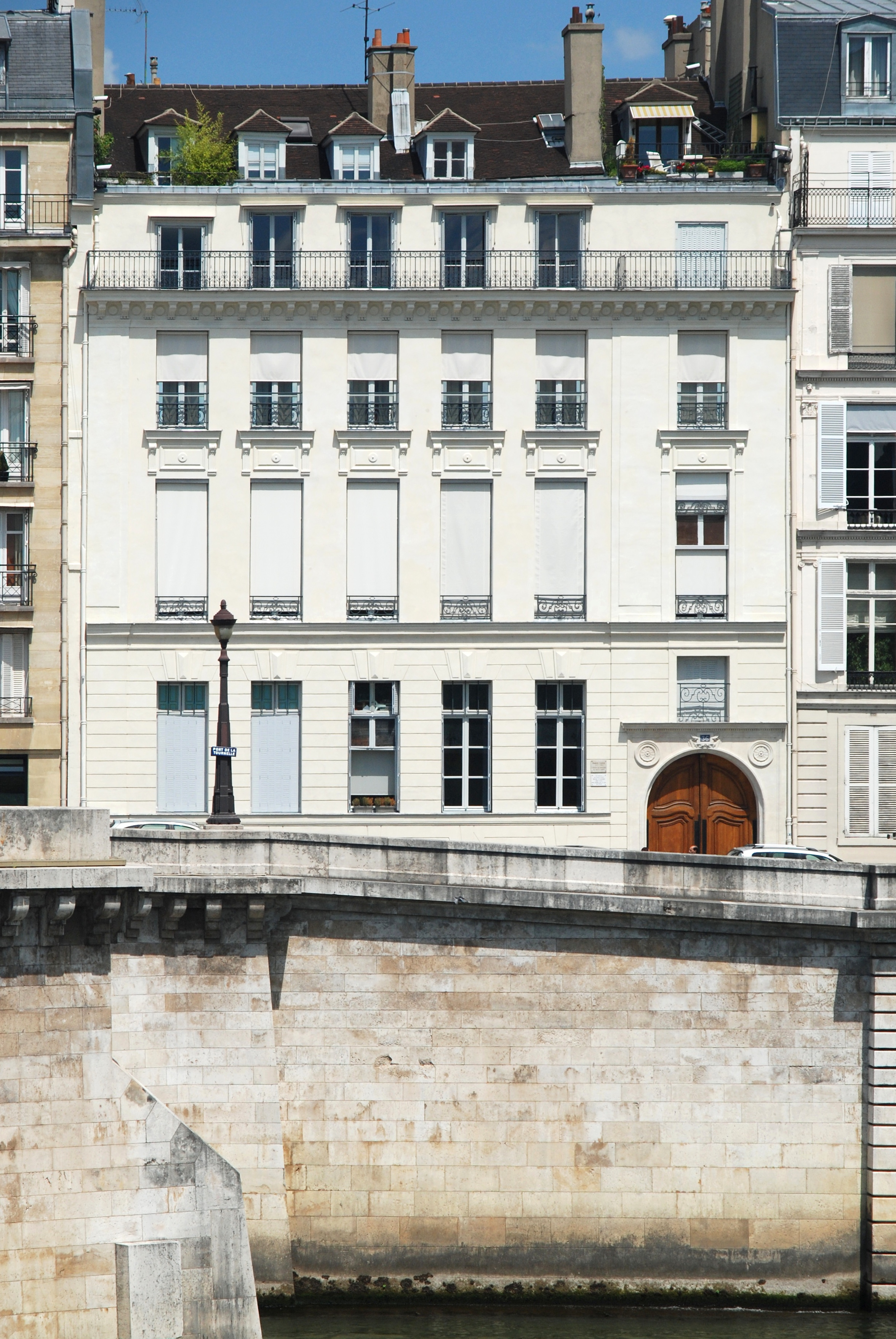 36, Quai de Béthune. Près de la porte il y a deux plaques: MARIE CURIE/ 1867-1934/ a habité cet immeuble/ DE 1912 à 1934 et ICI VECUT/ DE 1952 A 1976/ RENE CASSIN/ 1887-1976/ PRIX NOBEL DE LA PAIX/ EN 1968.